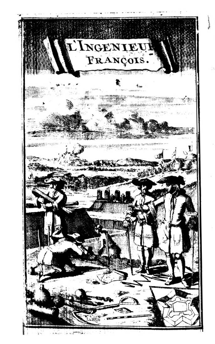 L' ingenieur françois, contenant la geometrie pratique sur le papier & sur le terrain avec le toisé des travaux & des bois; ... Avec la methode de monsieur de Vauban, ... Par m. N ingenieur ordinaire du roy. - A Paris : chez Estienne Michalet, 1696. - [22], 204, [4] p., [34] c. di tav. ripieg. ; 8º .